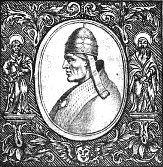 Ppaež Celestýn III.